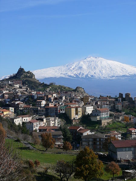 Панорамен изглед от град Чезаро